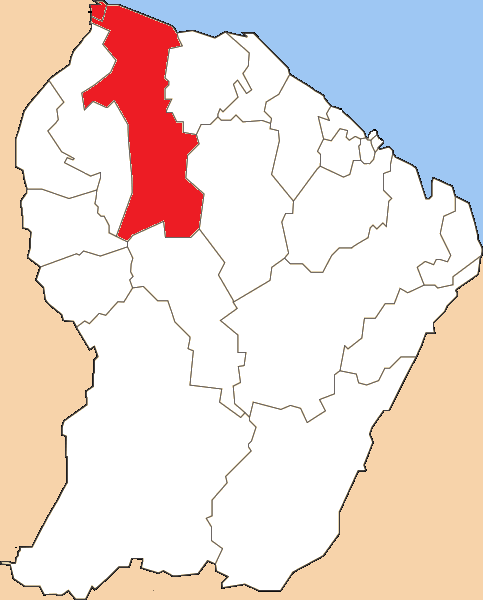 Situation du canton dans le département de la Guyane